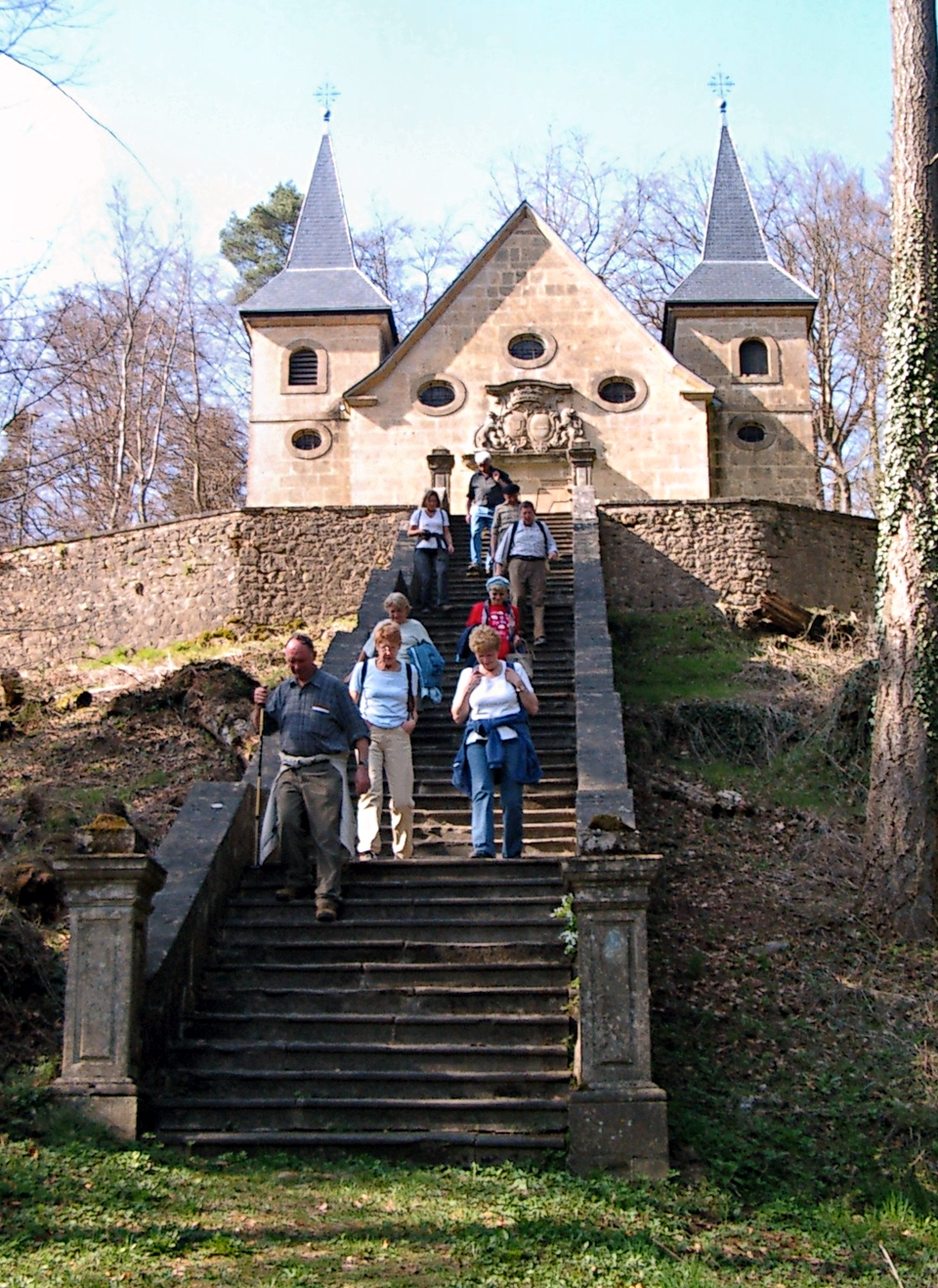 D'Kapell Mont Marie mat der Trap virdrun